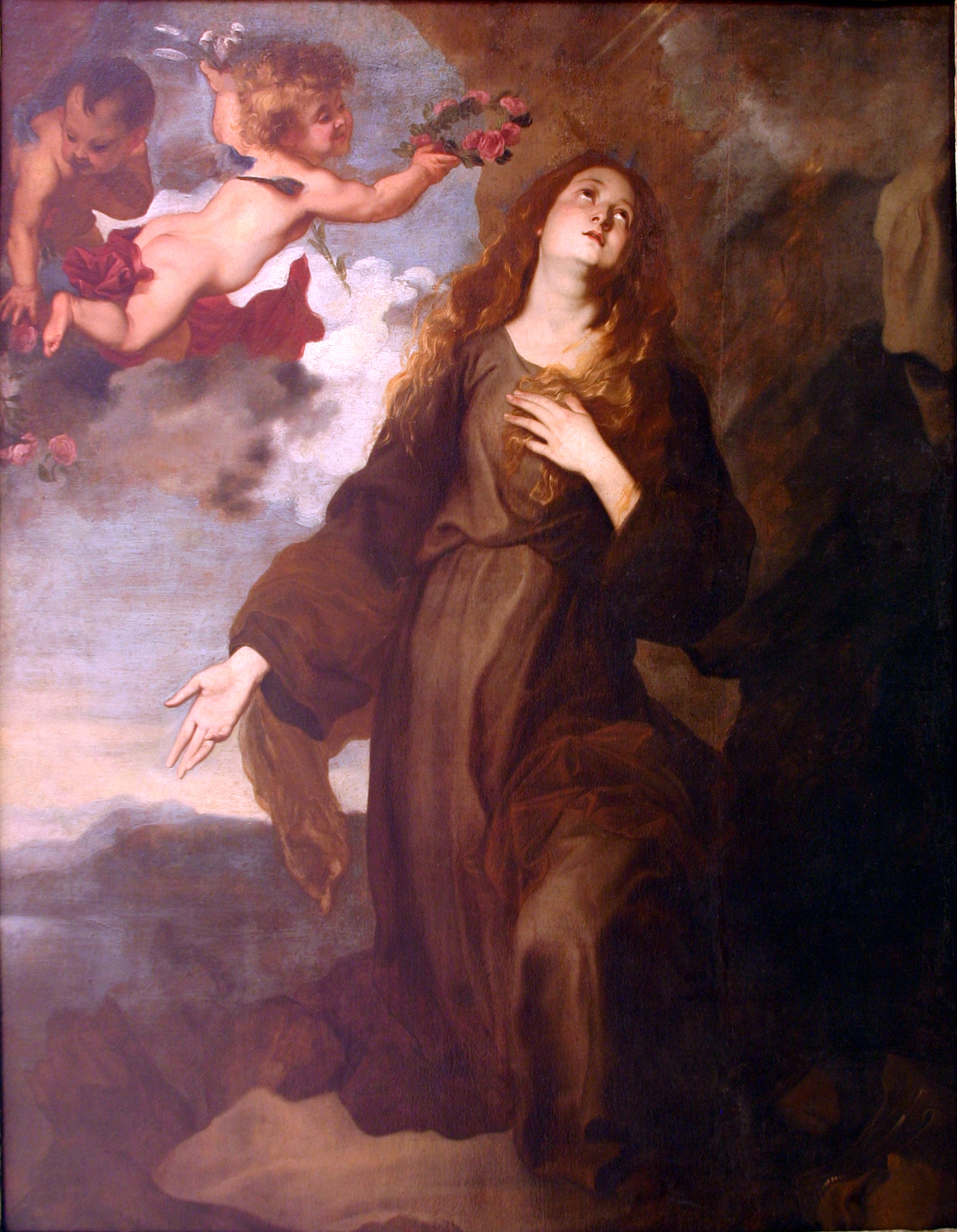 St. Rosalie in Glorylabel QS:Lit,"Santa Rosalia incoronata dagli angeli" label QS:Len,"St. Rosalie in Glory"